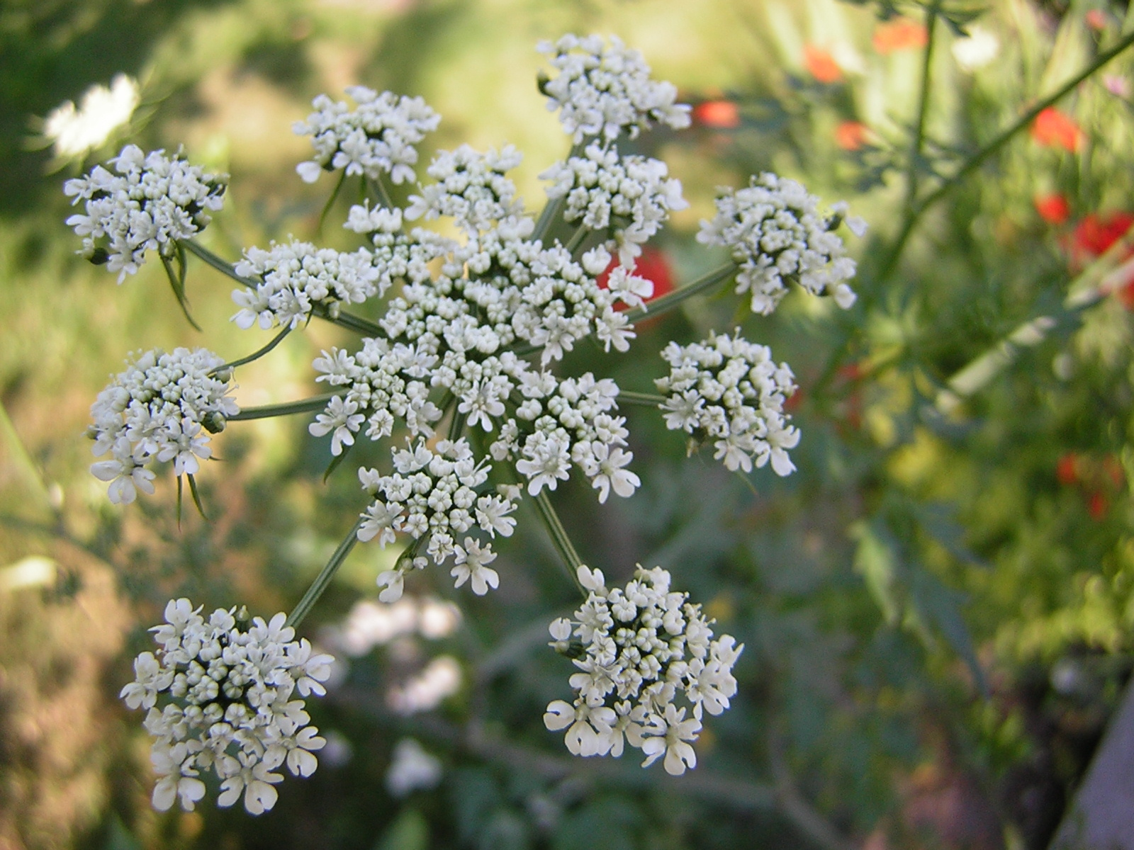 Kwiat pietruszki